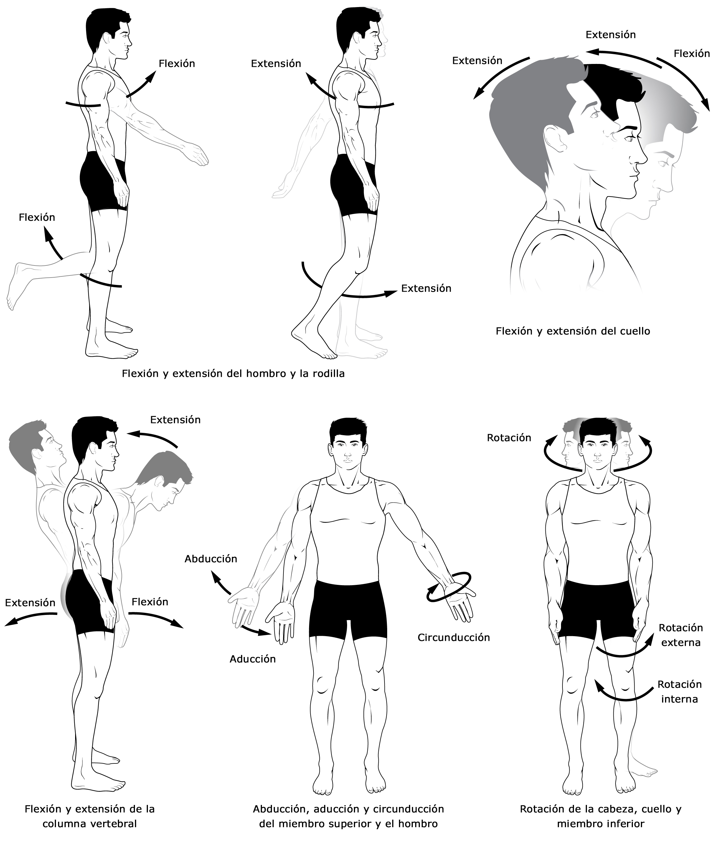 Principales movimientos corporales.